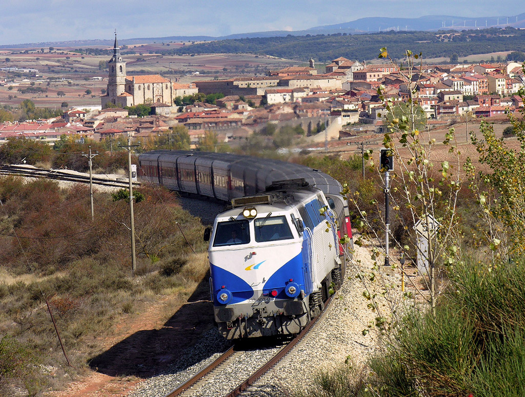 El Talgo Bilbao - Madrid, remolcado por la locomotora 333.103, en Lerma, en el Ferrocarril de Madrid a Burgos por Aranda de Duero ("directo de Burgos")